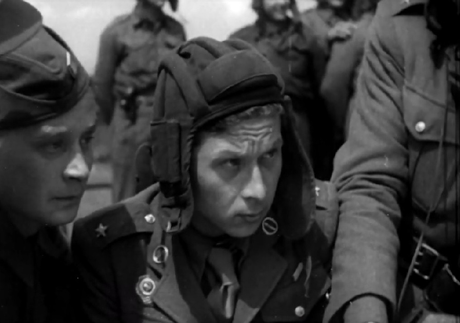 Při osvobozování Československa, 1945